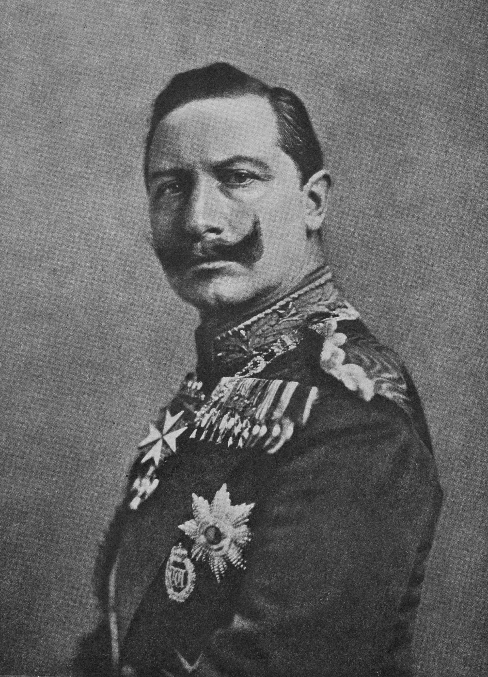 Вильгельмъ II, король прусскій, императоръ германскій. Данное изображение было использовано в статье «Вильгельм II» опубликованной в шестом томе «Военной энциклопедии», который был издан книгоиздательским товариществом Ивана Дмитриевича Сытина в 1912 году в столице Российской империи городе Санкт-Петербурге.